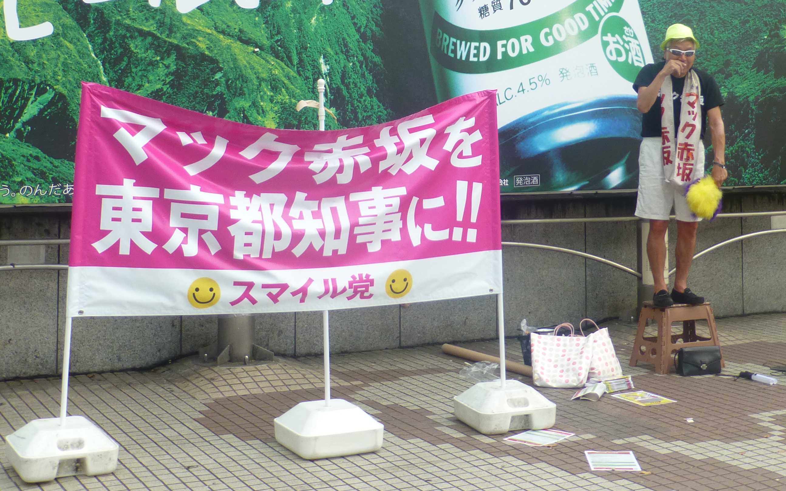 Mac Akasaka in Shibuya (マック赤坂、渋谷にて)